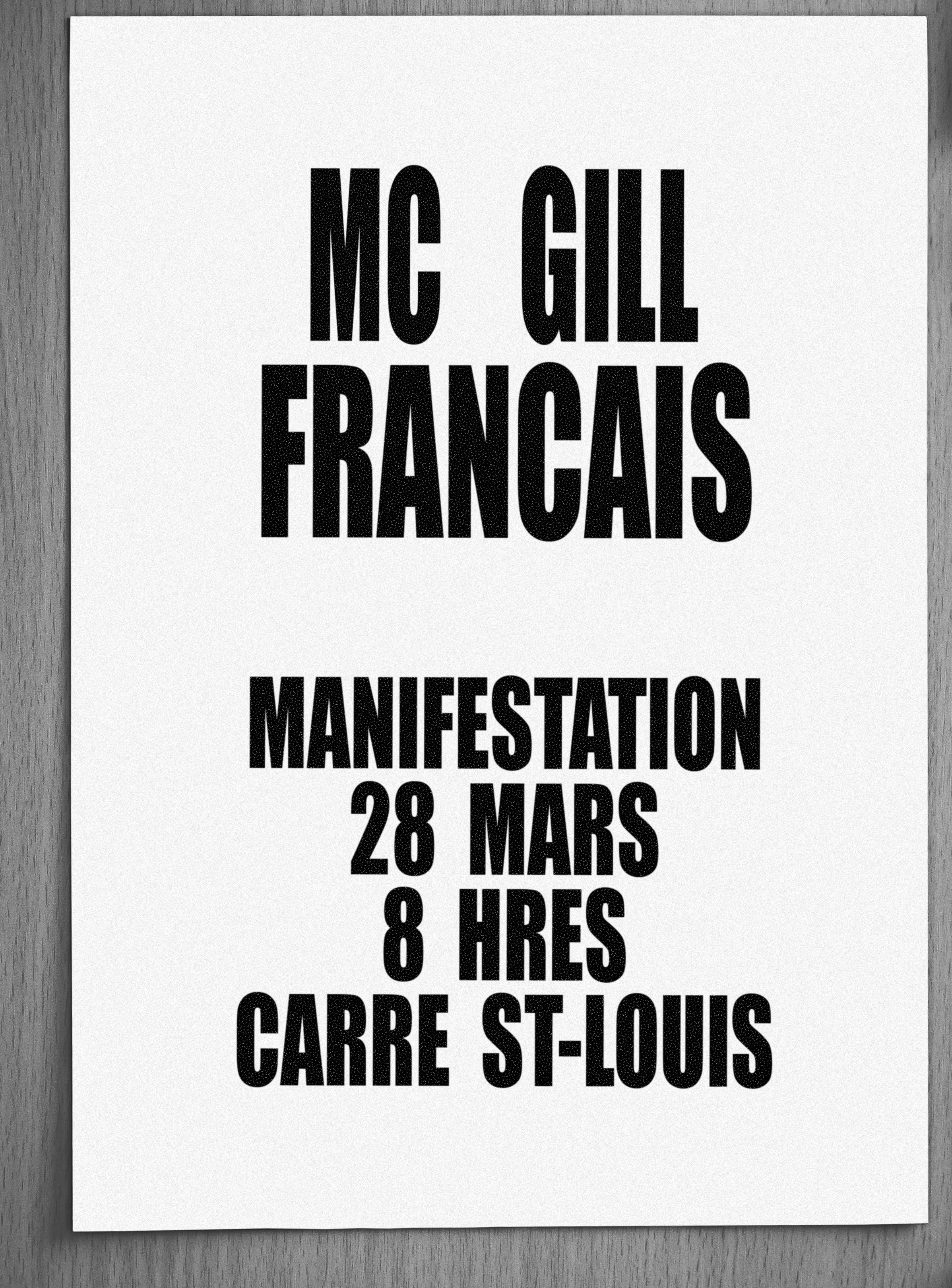 Reproduction d'une affiche McGill français utilisée lors de la manifestation du 28 mars 1969.